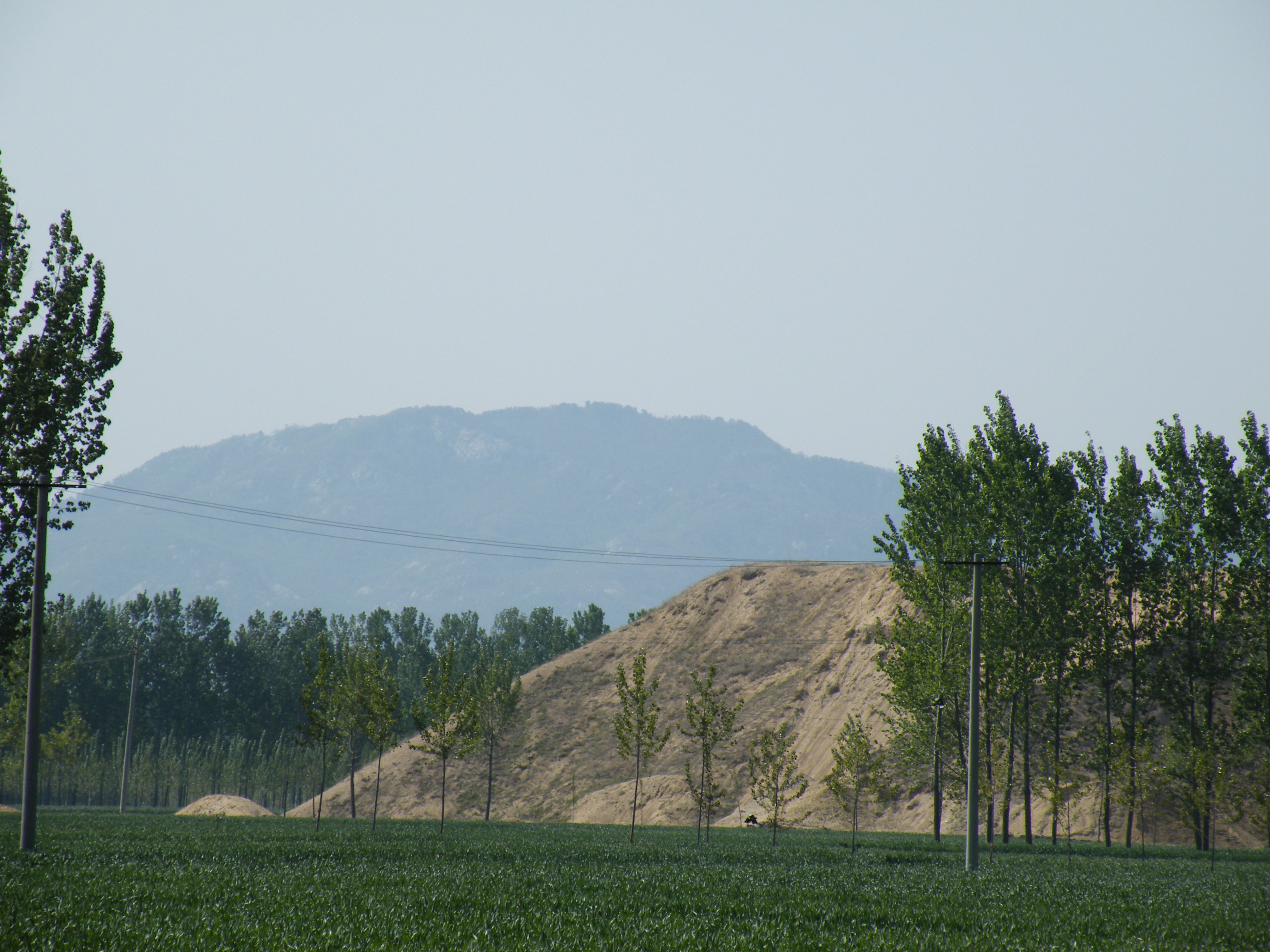 Ningyang, Tai'an, Shandong, China